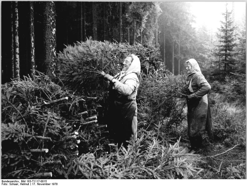 Stapeln von Weihnachtsbäumen ADN-ZB Schaar 17.11.78 Bez. Suhl: Rund 38.000 Weihnachtsbäume werden in den nächsten Tagen im Forstwirtschaftsbetrieb Hildburghausen eingeschlagen. 23.000 davon sind für die Hauptstadt Berlin bestimmt - weitere Lieferungen gehen in die industriellen Ballungsgebiete Leipzig, Halle und Karl-Marx-Stadt. Die Waldarbeiterinnen Else Höhlein (vorn) und Anna Lautrebach bereiten die Bäumchen für den Versand vor.